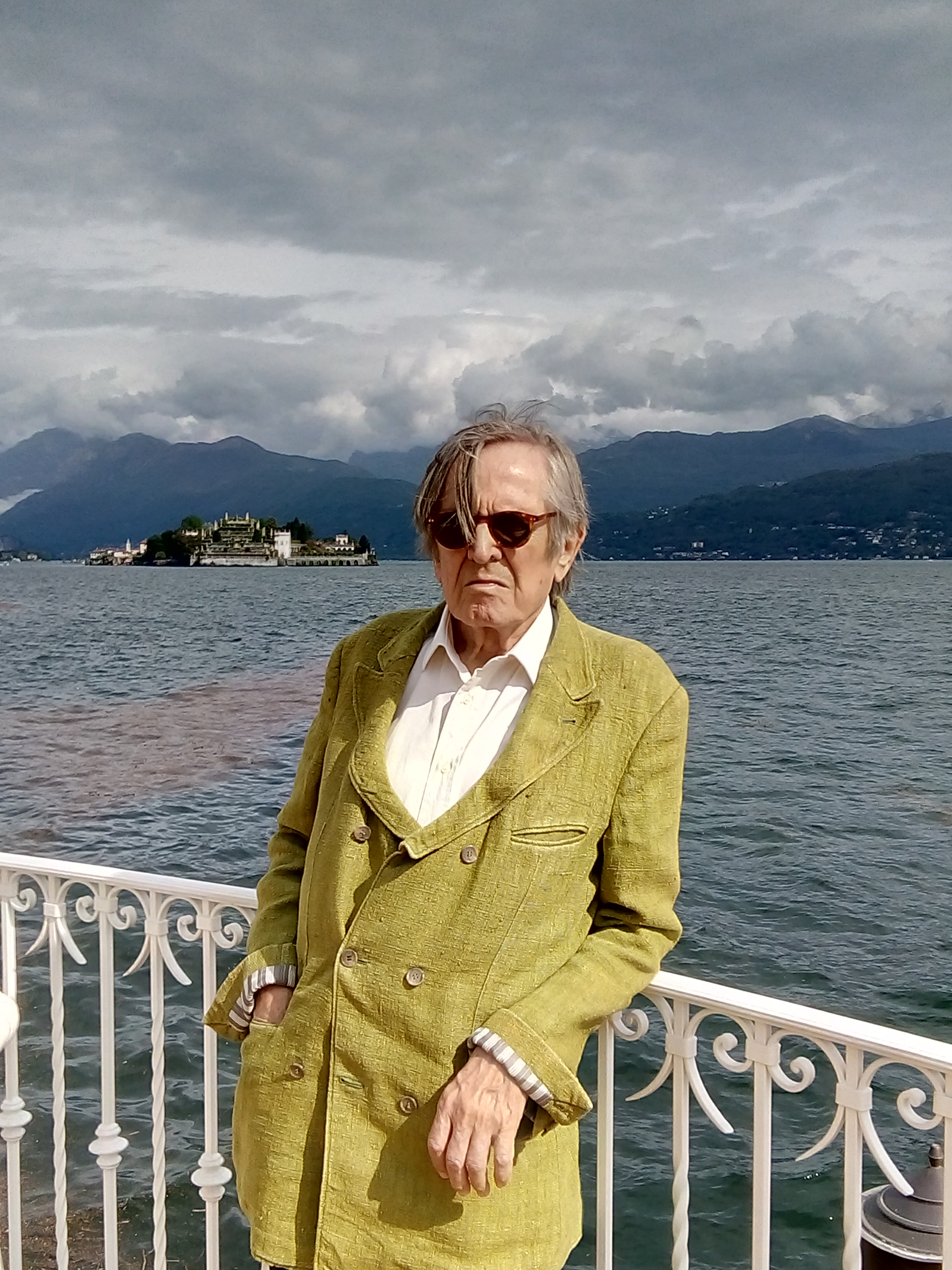 Antonio Recalcati